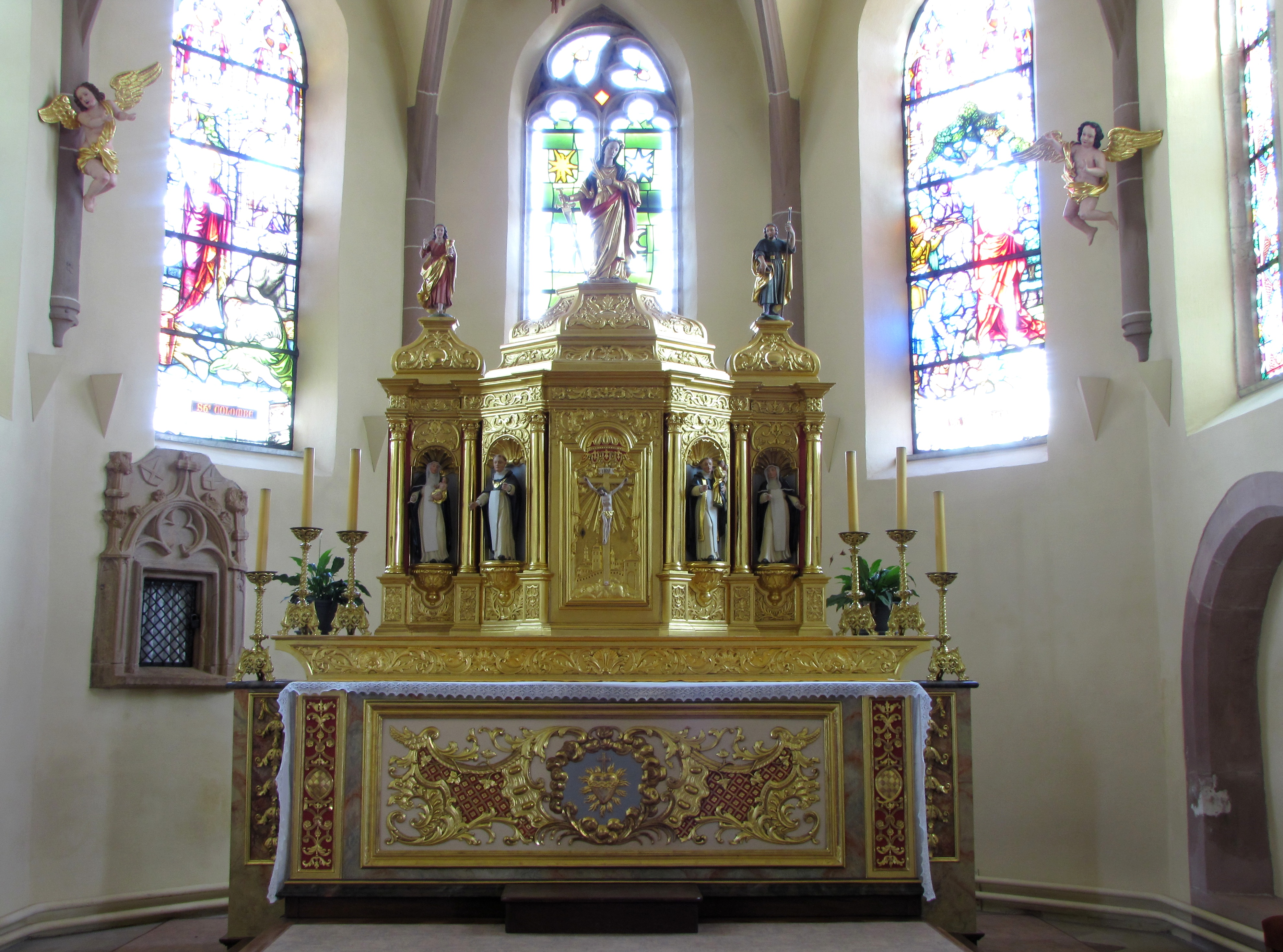 Alsace, Haut-Rhin, Église Sainte-Colombe (XIIe-XVIIIe) de Hattstatt (PA00085456, IA68004258).Ancien maître-autel du Couvent d'Unterlinden (XVIIIe-XIXe): This object is classé Monument Historique in the base Palissy, database of the French furniture patrimony of the French ministry of culture, under the references PM68000106 and IM68007553. Armoire eucharistique (XVe): This object is classé Monument Historique in the base Palissy, database of the French furniture patrimony of the French ministry of culture, under the references PM68000110 and IM68007554. Statuettes d'anges (XVIIIe): This object is classé Monument Historique in the base Palissy, database of the French furniture patrimony of the French ministry of culture, under the references PM68001068 and IM68007564.